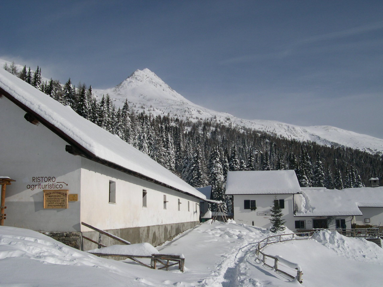 Malga Coltrondo at Comelico Superiore, Belluno, Dolomites, Veneto, Italy.